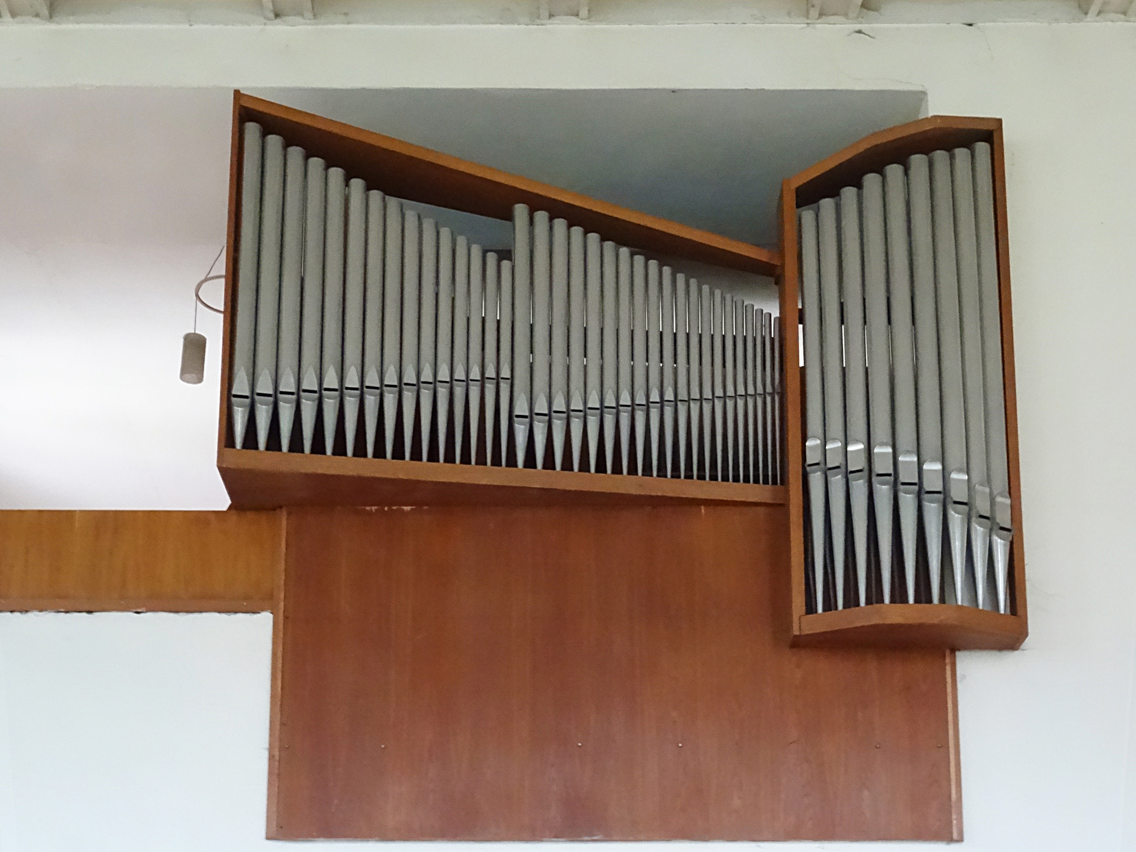 Orgel der Auferstehungskirche Drackendorf. Das Instrument wurde um 1970 von Orgelbaumeister Günter Bahr aus Weimar gebaut, 1987 Wiederaufbau durch Wolfgang Nußbücker (Plau am See).[1]